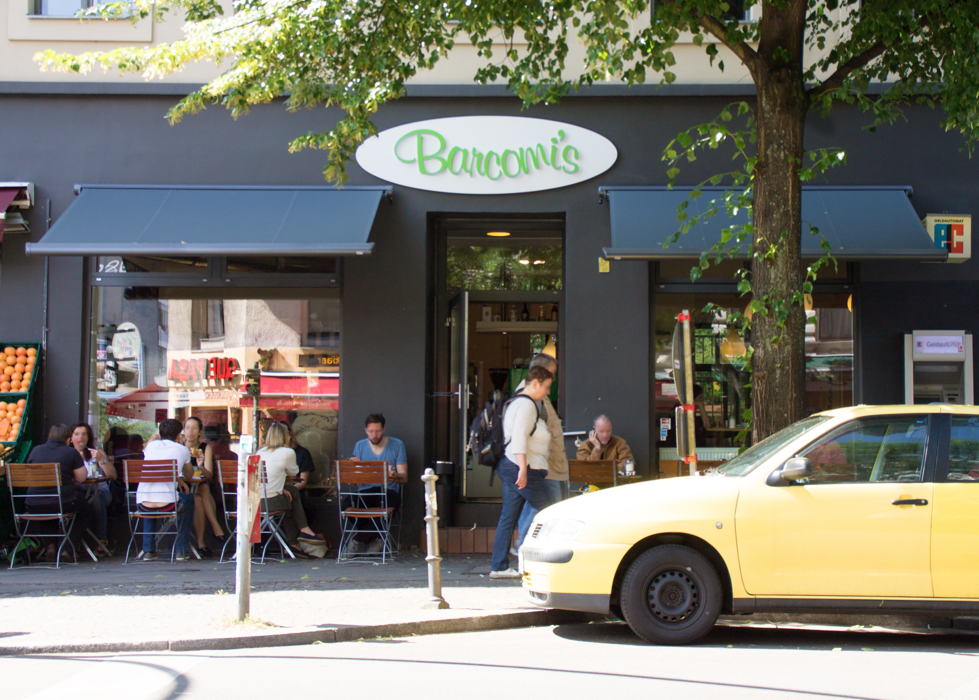 Barcomi's Kaffeerösterei in der Bergmannstraße 21, 10961 Berlin-Kreuzberg